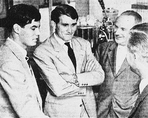 Torino, 2 luglio 1962. Da sinistra: due tra i neoacquisti della Juventus per la stagione 1962-63, Sandro Salvadore e Dante Crippa, a colloquio nella sede societaria con il neoeletto presidente del club, Vittore Catella, e il consigliere Giordanetti, in occasione delle visite mediche di rito.